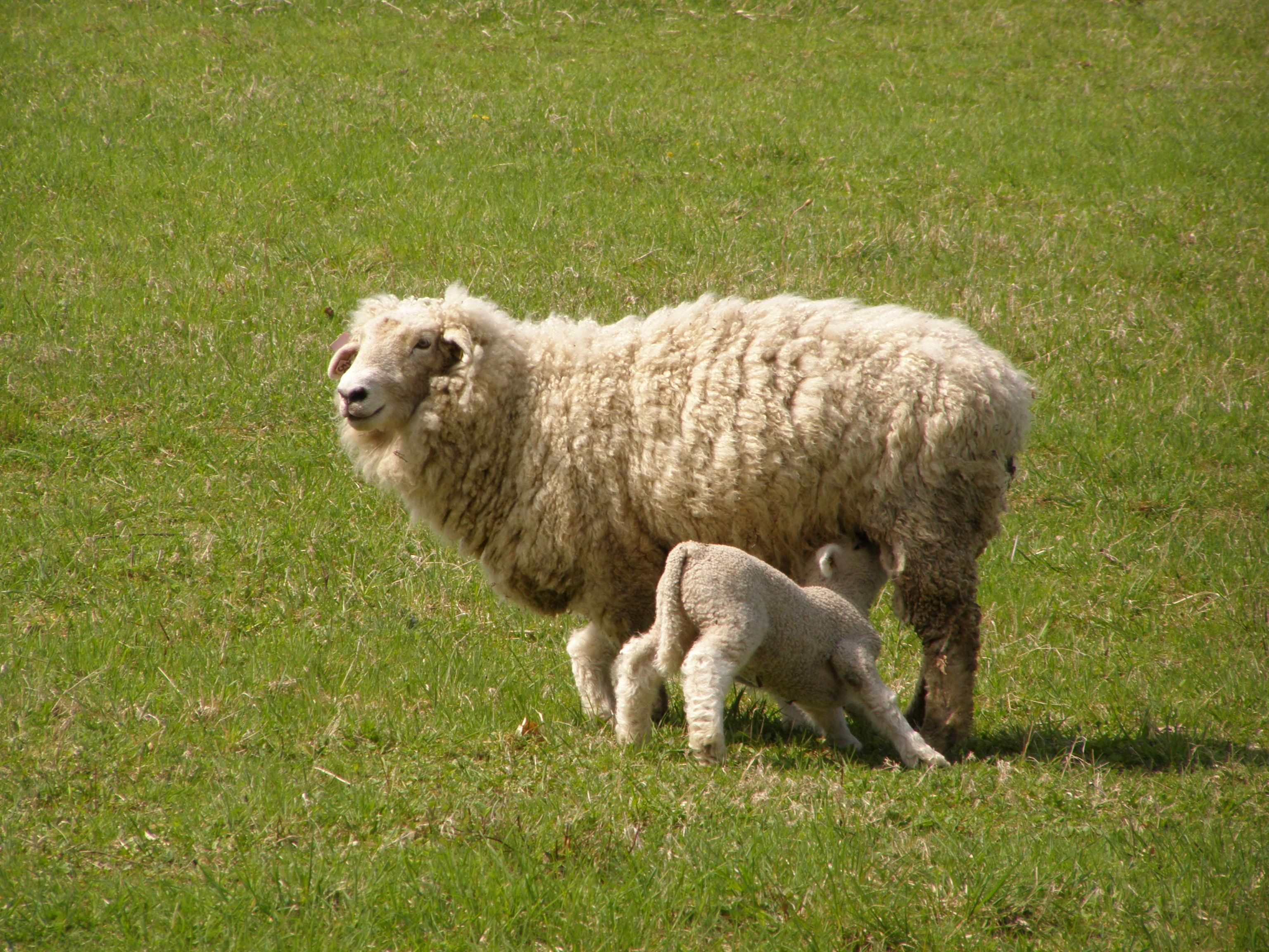 Frýdlantská pahorkatina, úbočí vrcholu Nad Zátiším (427 m) v katastru obce Frýdlant, ovce